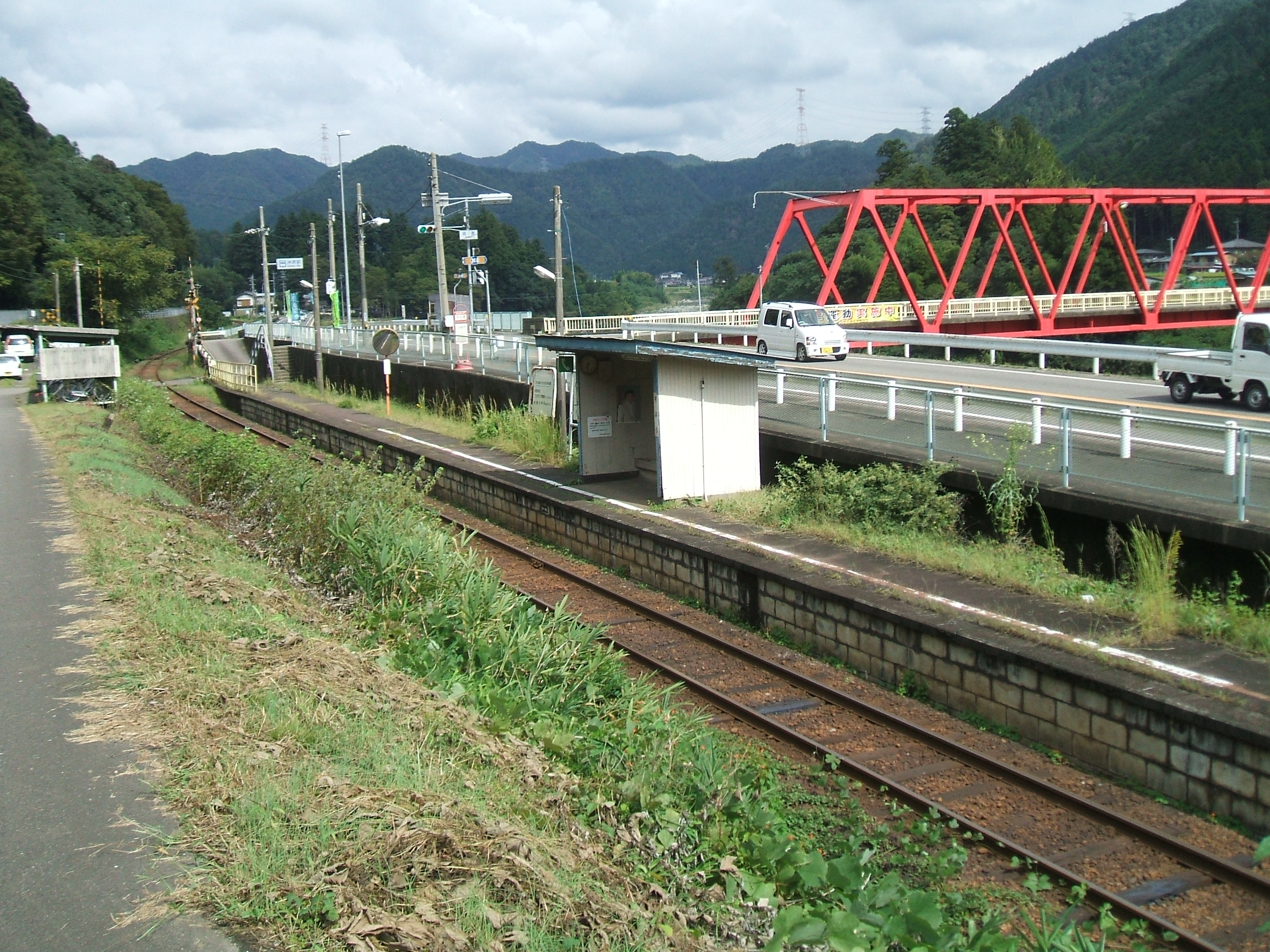 郡上方向、洲原橋が見える。駅横は156号線が走る。